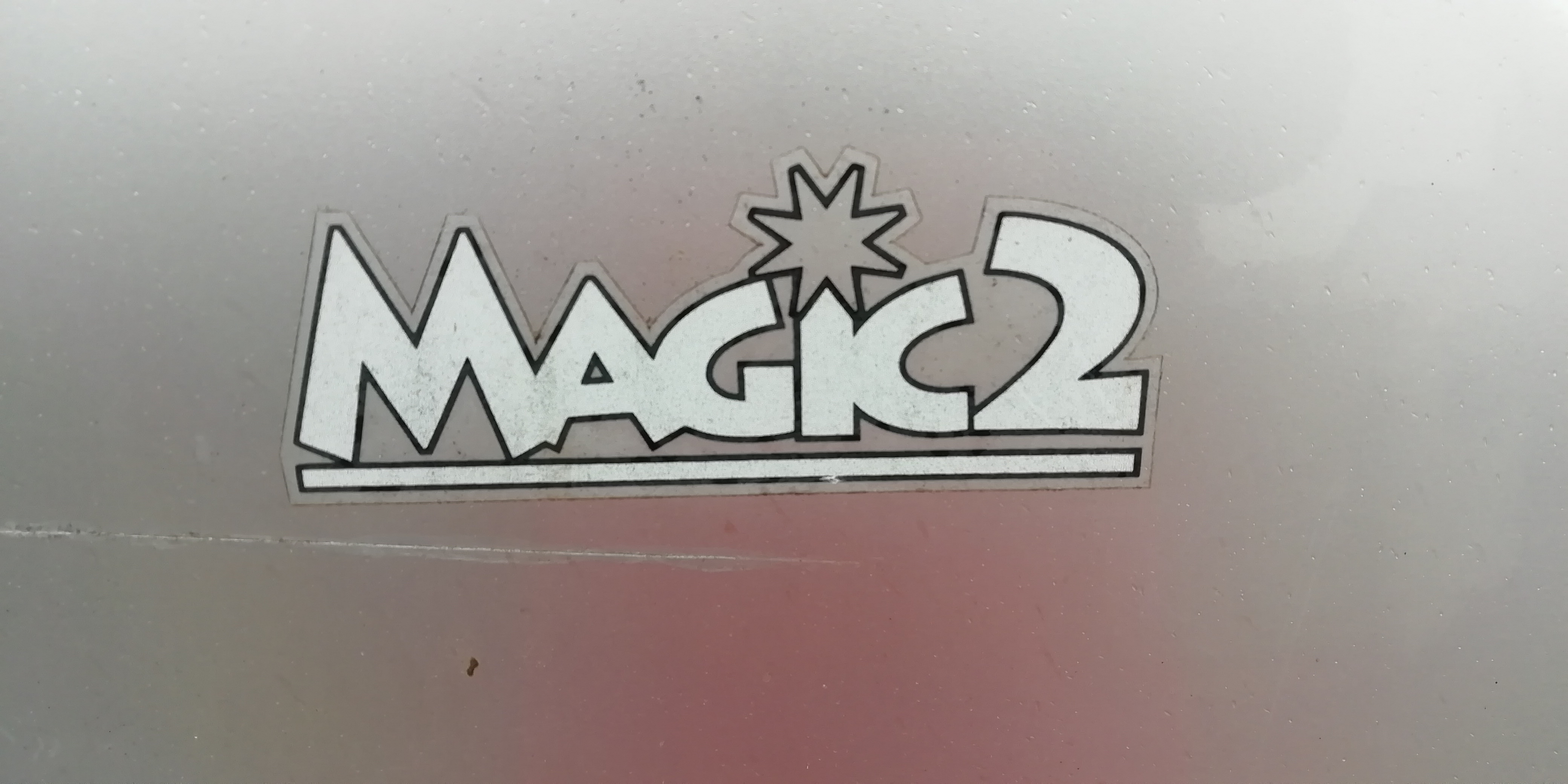 Huawei